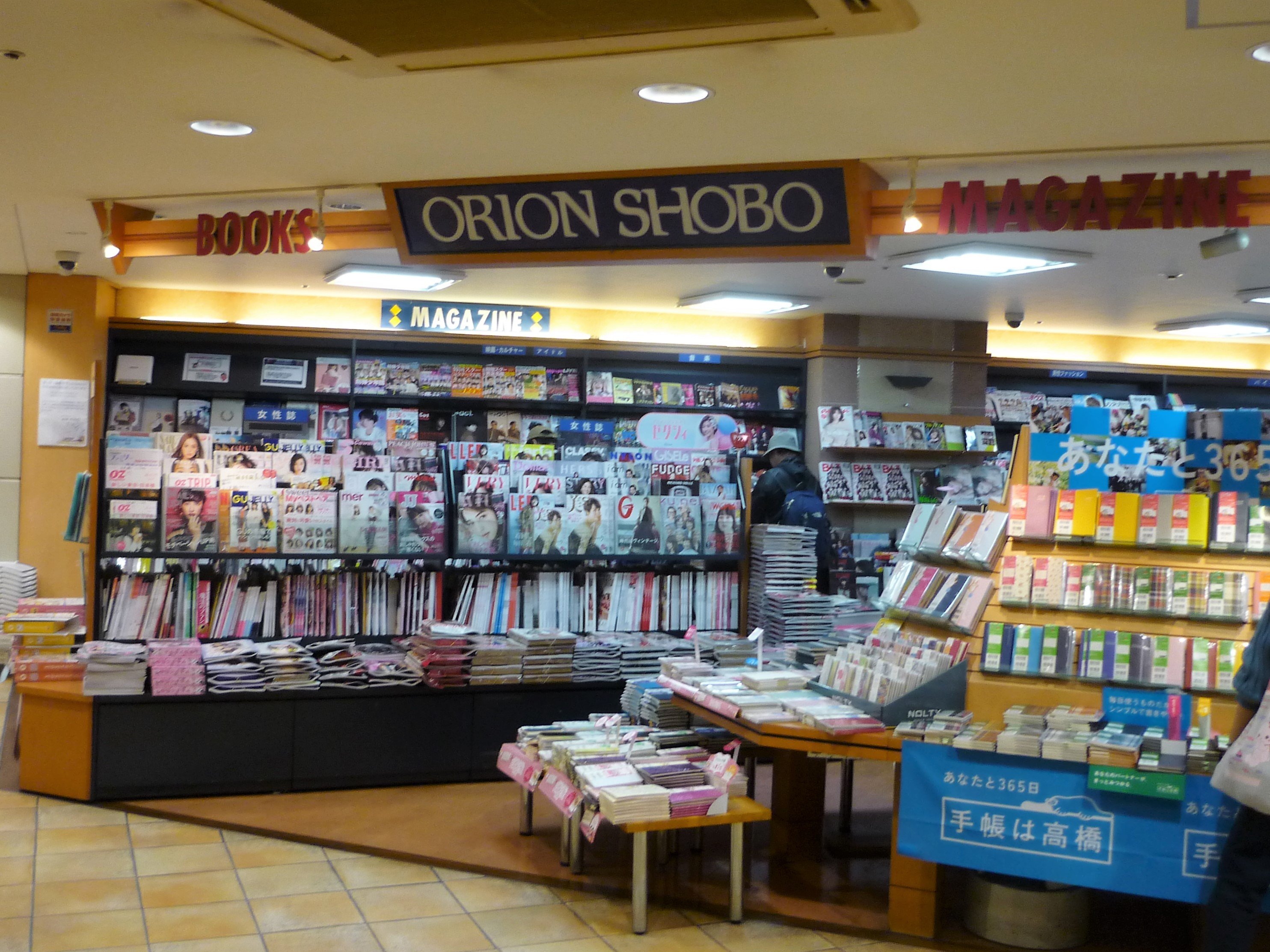 オリオン書房サザン店（立川駅南口）